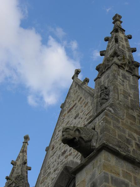 Église Saint-Martin de Moutiers (35). Gargouille et pinacles.